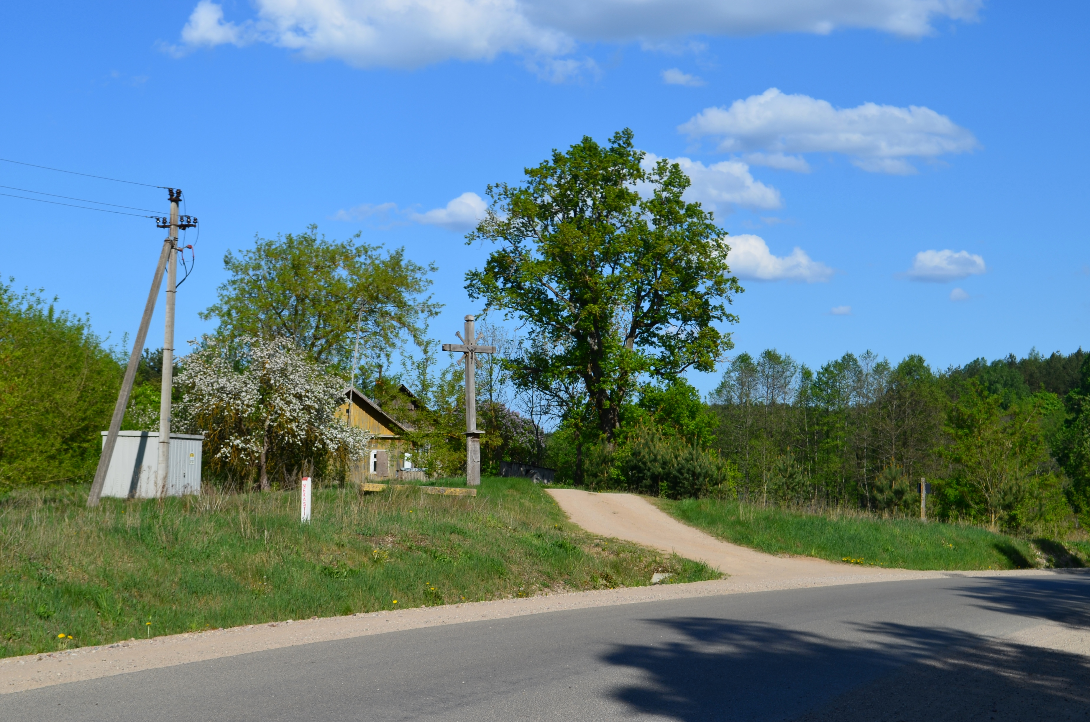 Golba, Luokesos sen., Molėtų raj.